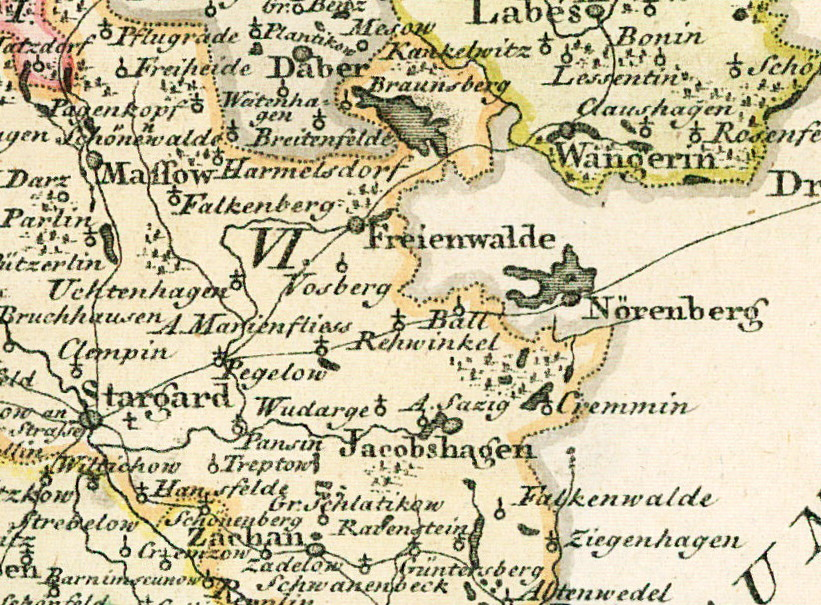 Hinterpommern, Kartenausschnitt der Region Stargard/Jacobshagen